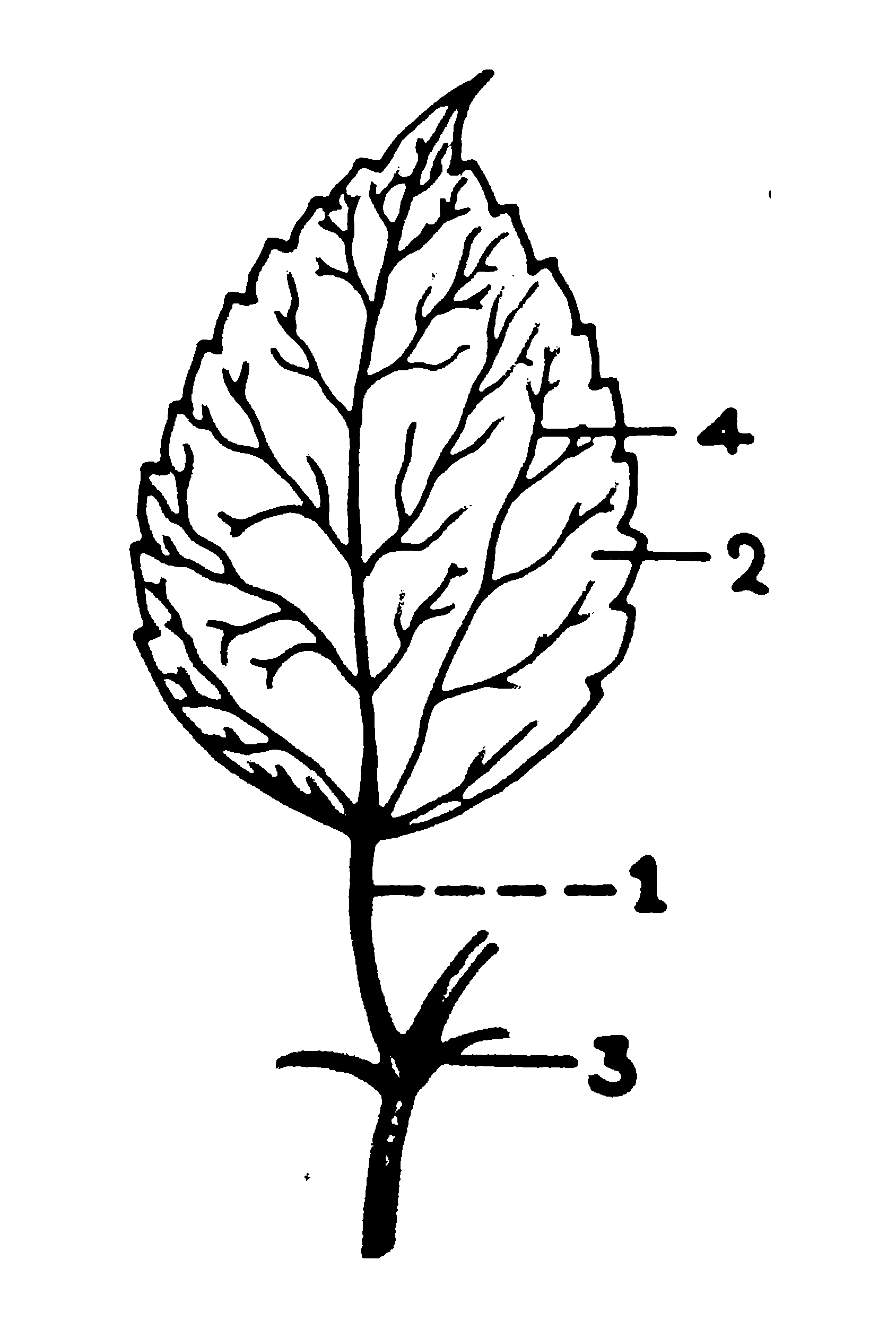 1.പത്രവൃന്തം 2. പത്രപാളി 3.ഉപപർണ്ണങ്ങൾ 4.സിര